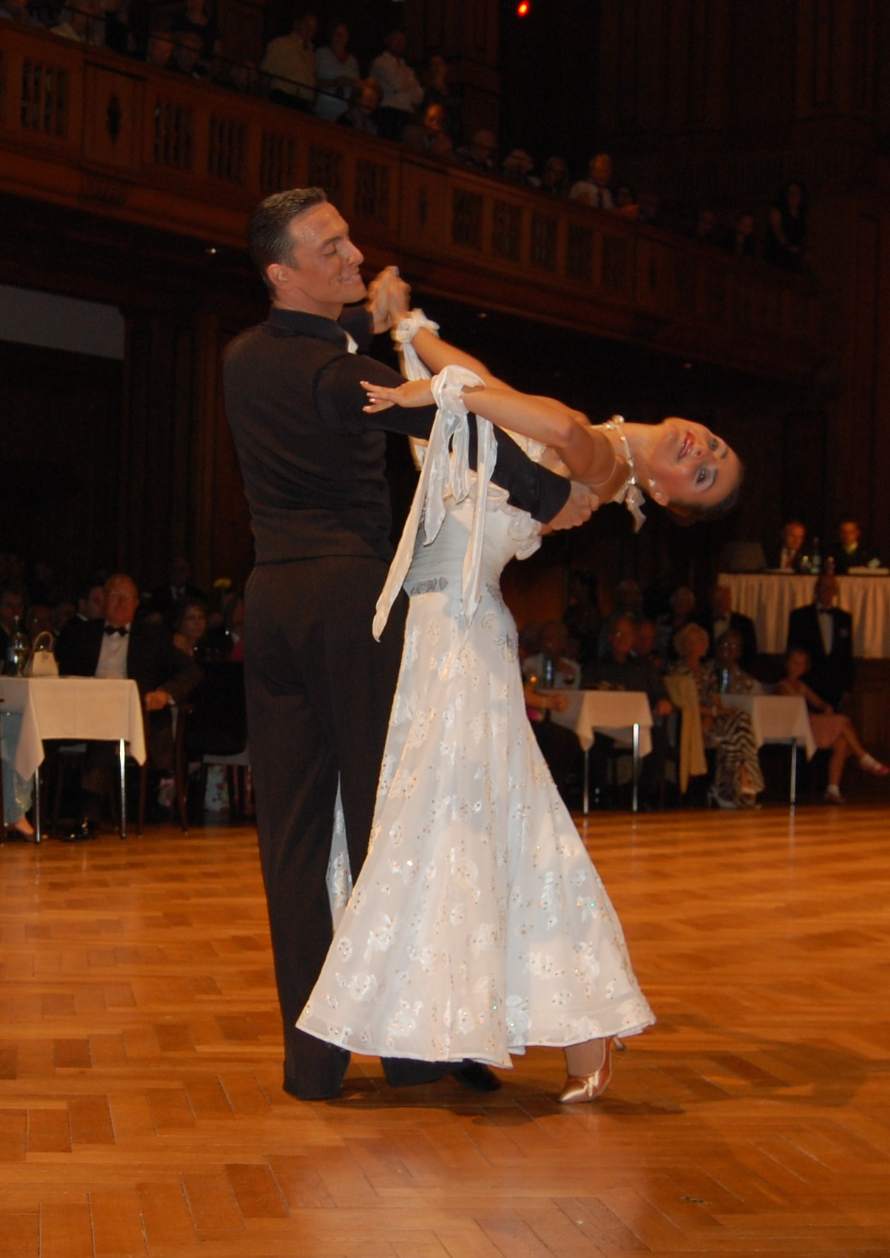 Benedetto Feruggia und Claudia Köhler, Deutsche Meister, Europa- (2009,2010) und Weltmeister (2009) der Amateure im Standardtanz, beim Wiener Walzer (2010)